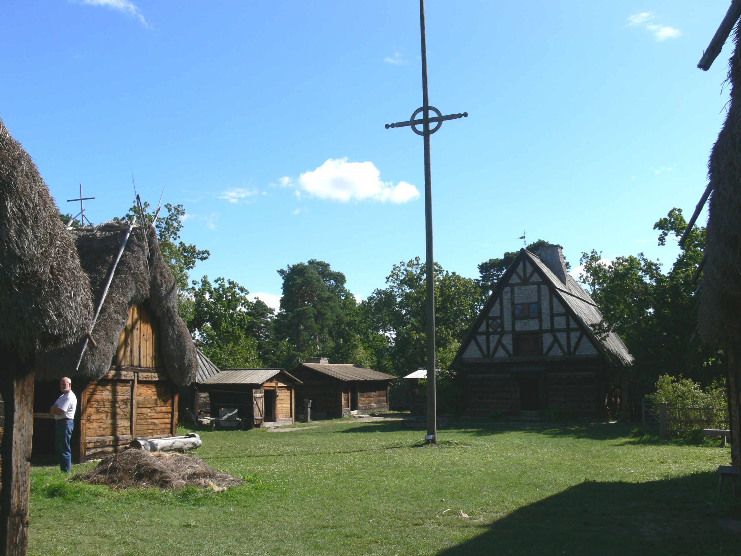 Bunge Museum auf Gotland. Bauernhof ( 17.Jhdt. ): Hofgelände